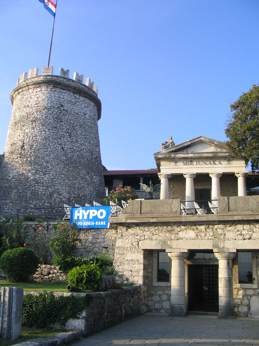 Trsat